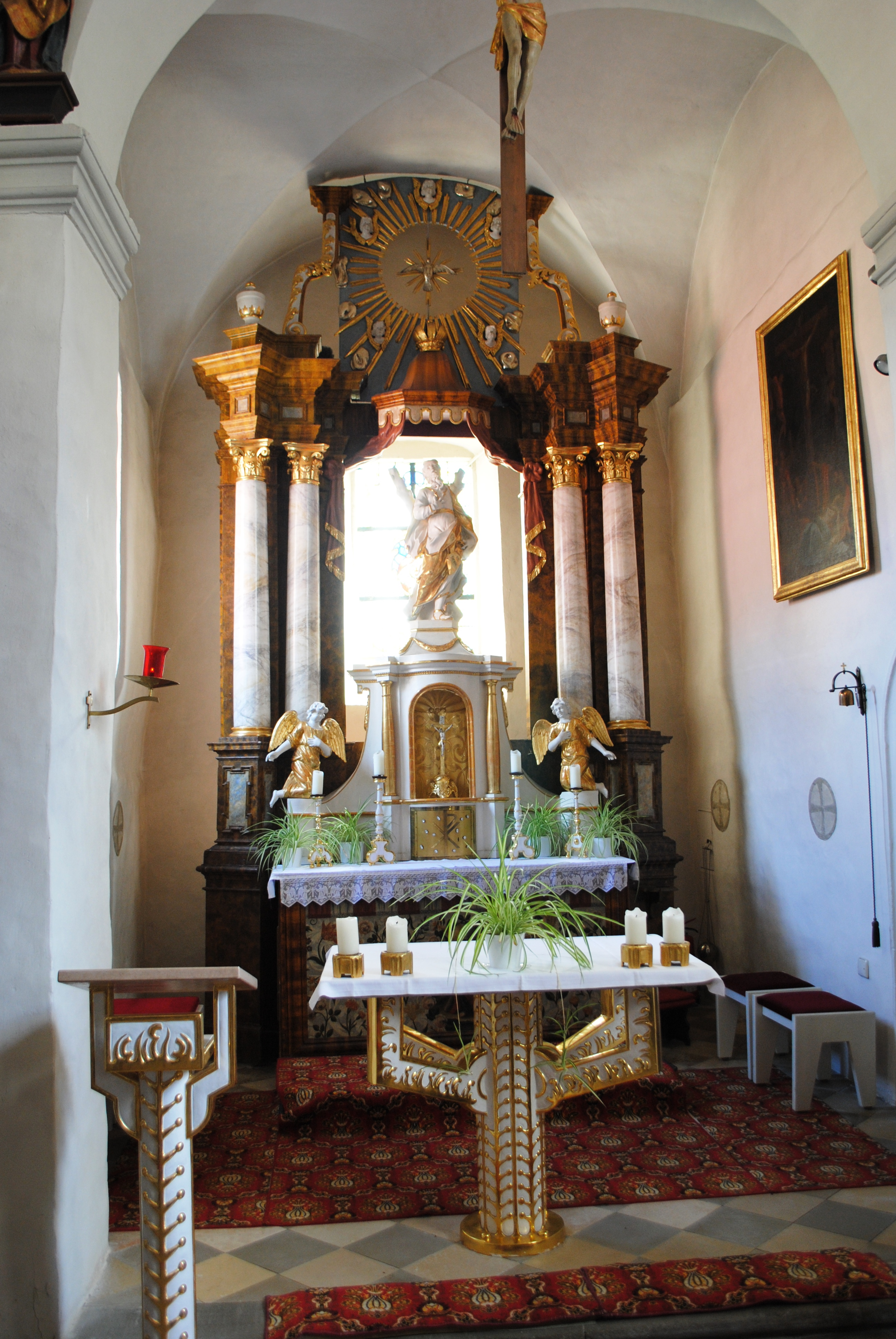 Altar, Kirche Köhler St. Andreas